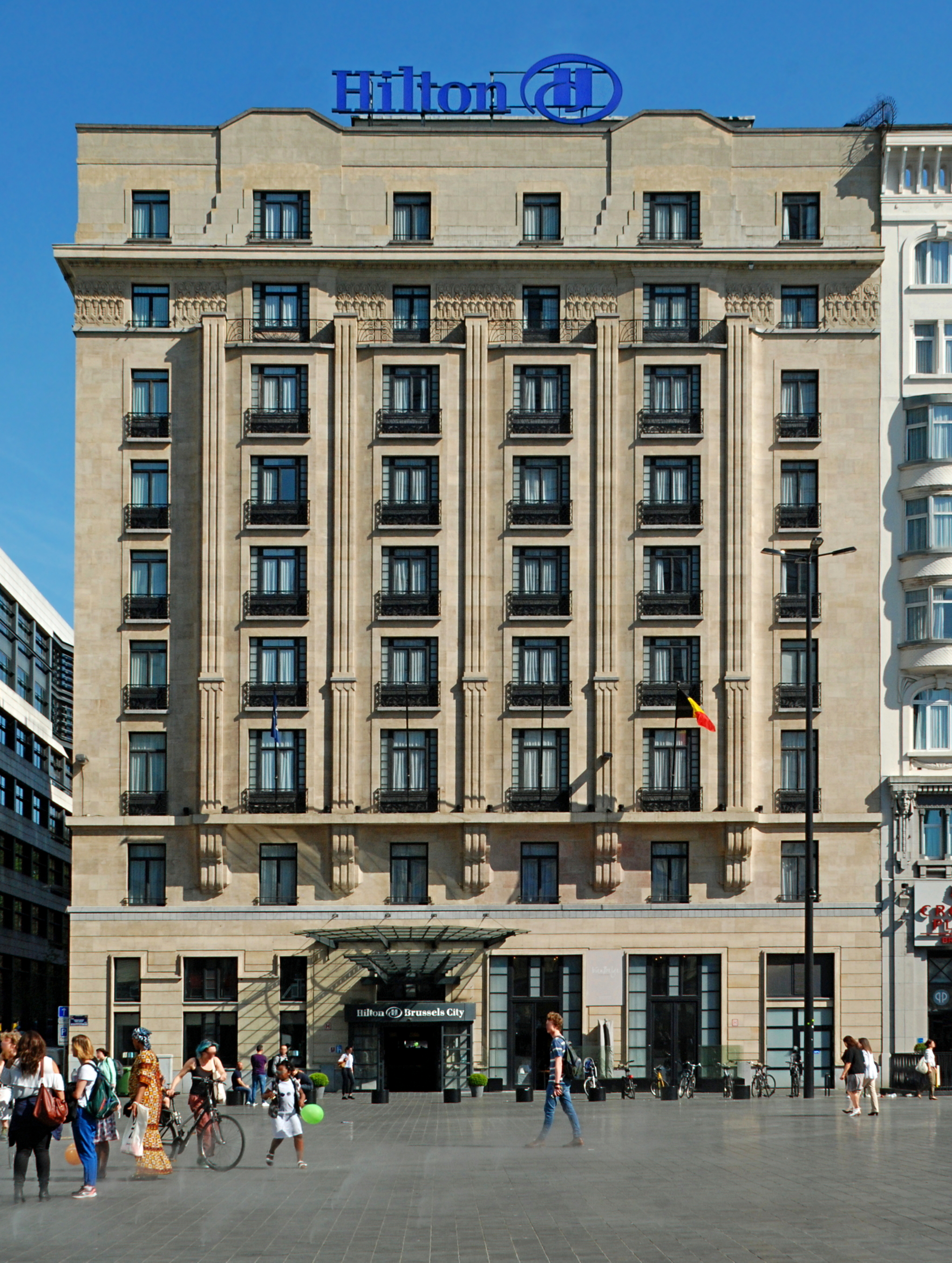 Belgique - Bruxelles - Place Rogier - Hôtel Albert Ier (Art déco - Michel Polak - 1927-1928)